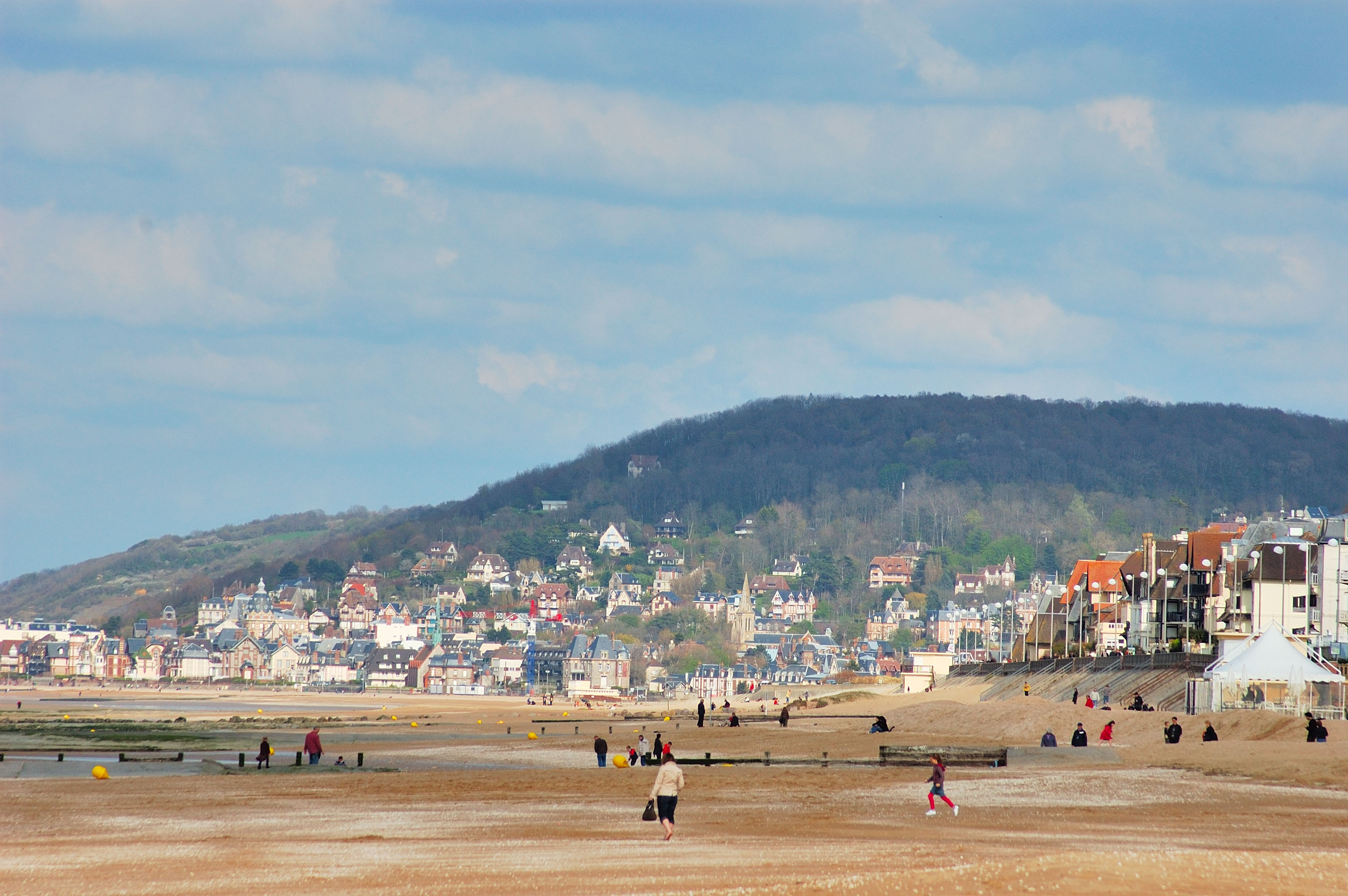 La plage de Cabourg avec en arrière-plan Houlgate et la butte d'Houlgate.